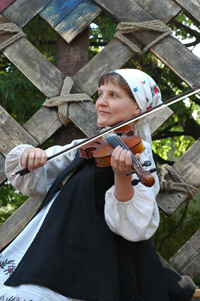 Ірина Абашина, Країна мрій-2006